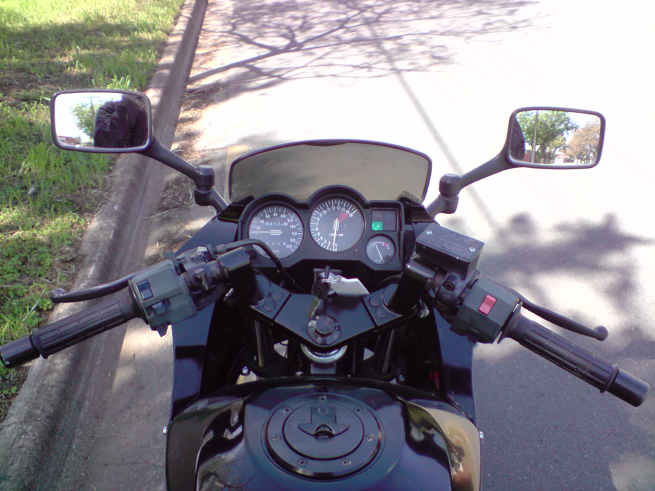 Kawasaki EX 250, Model 1993